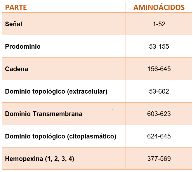 En esta imagen se puede observar las diferentes partes de la proteína MT5-MMP con su secuencia de aminoácidos correspondiente.